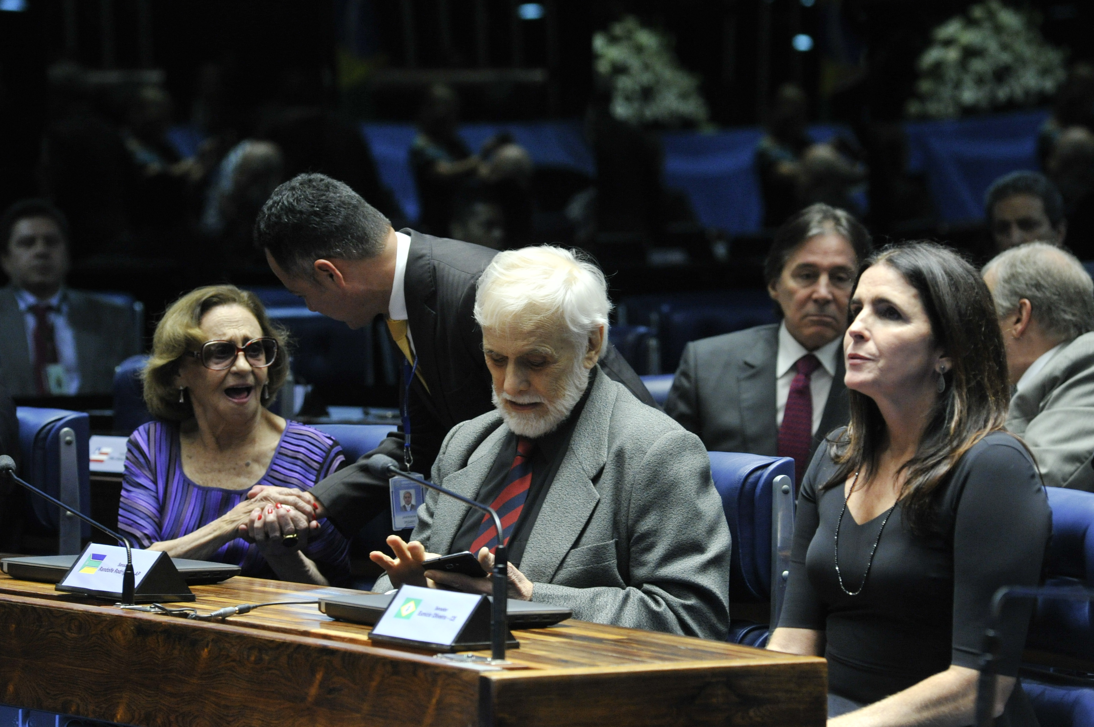 Plenário do Senado Federal durante sessão especial para comemorar o cinquentenário das atividades da TV Globo. E/D: atriz Laura Cardoso; ator Francisco Cuoco; atriz Malu Mader. Foto: Geraldo Magela/Agência Senado